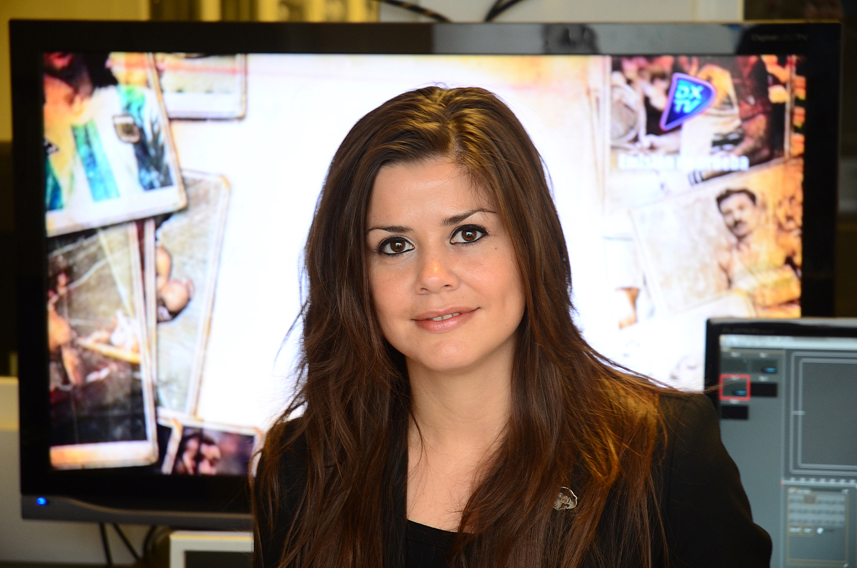 Jesica Tritten